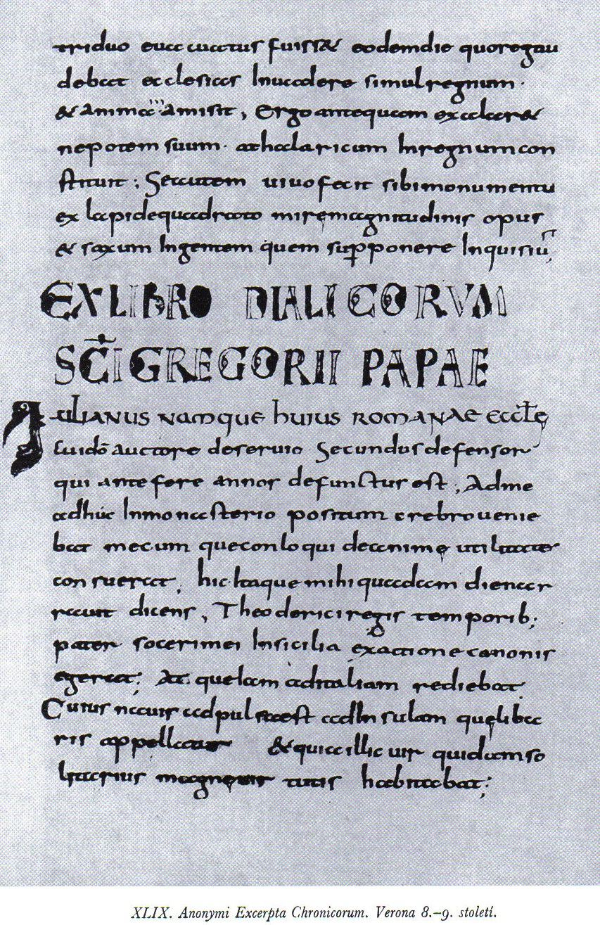 Anonymi Excerpta Chronicorum. Verona 8.-9. století